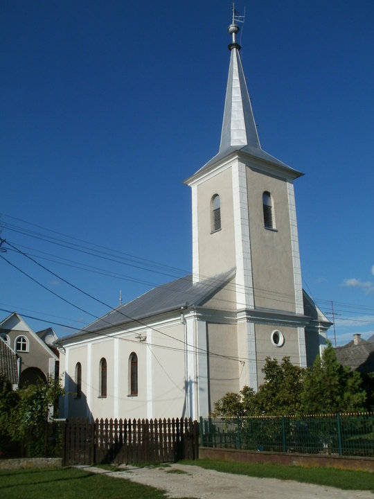 Nevetlenfalu református temploma (2012)